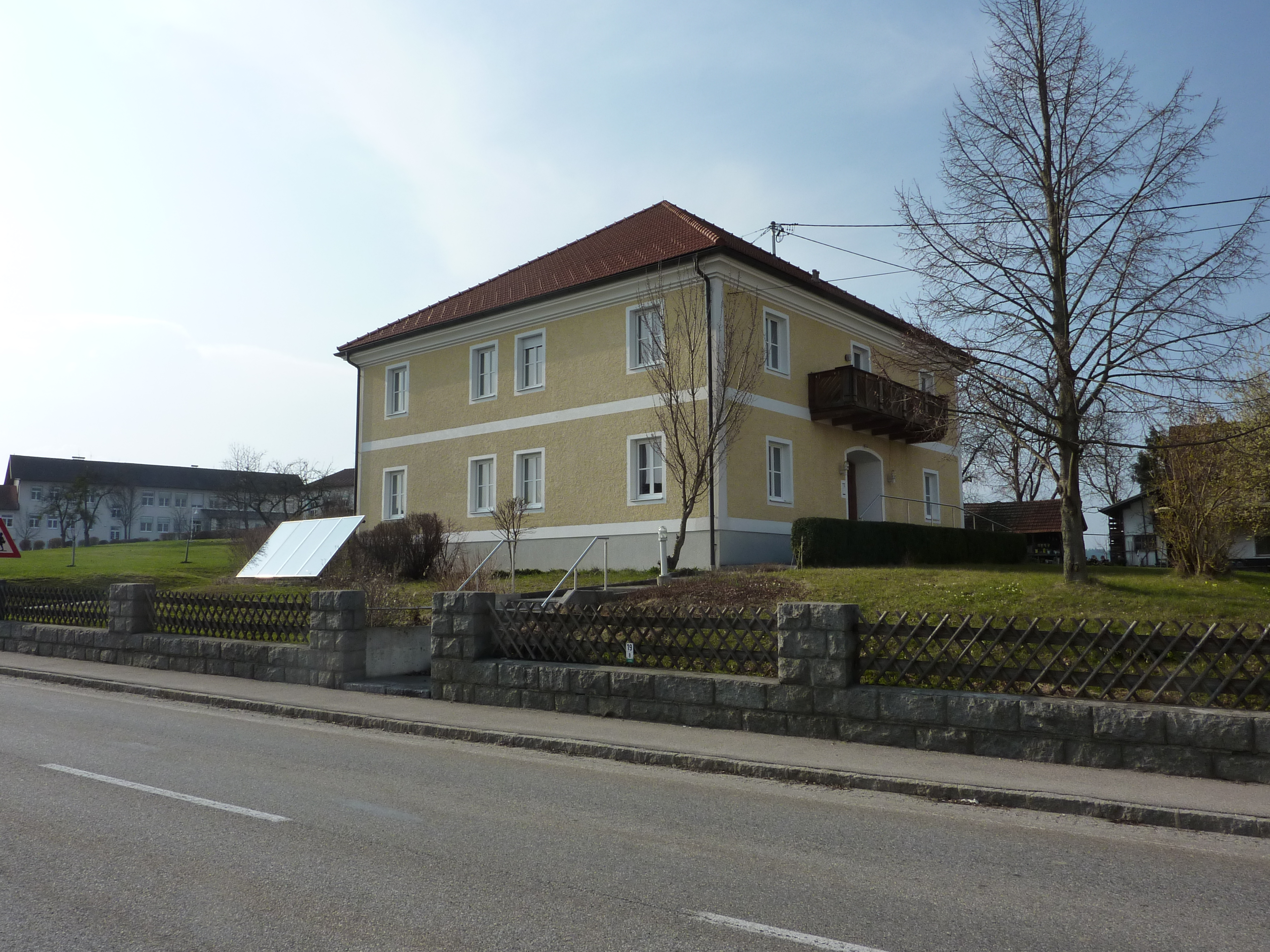 Pfarrkirche, Höhnhart 25, Oberösterreich